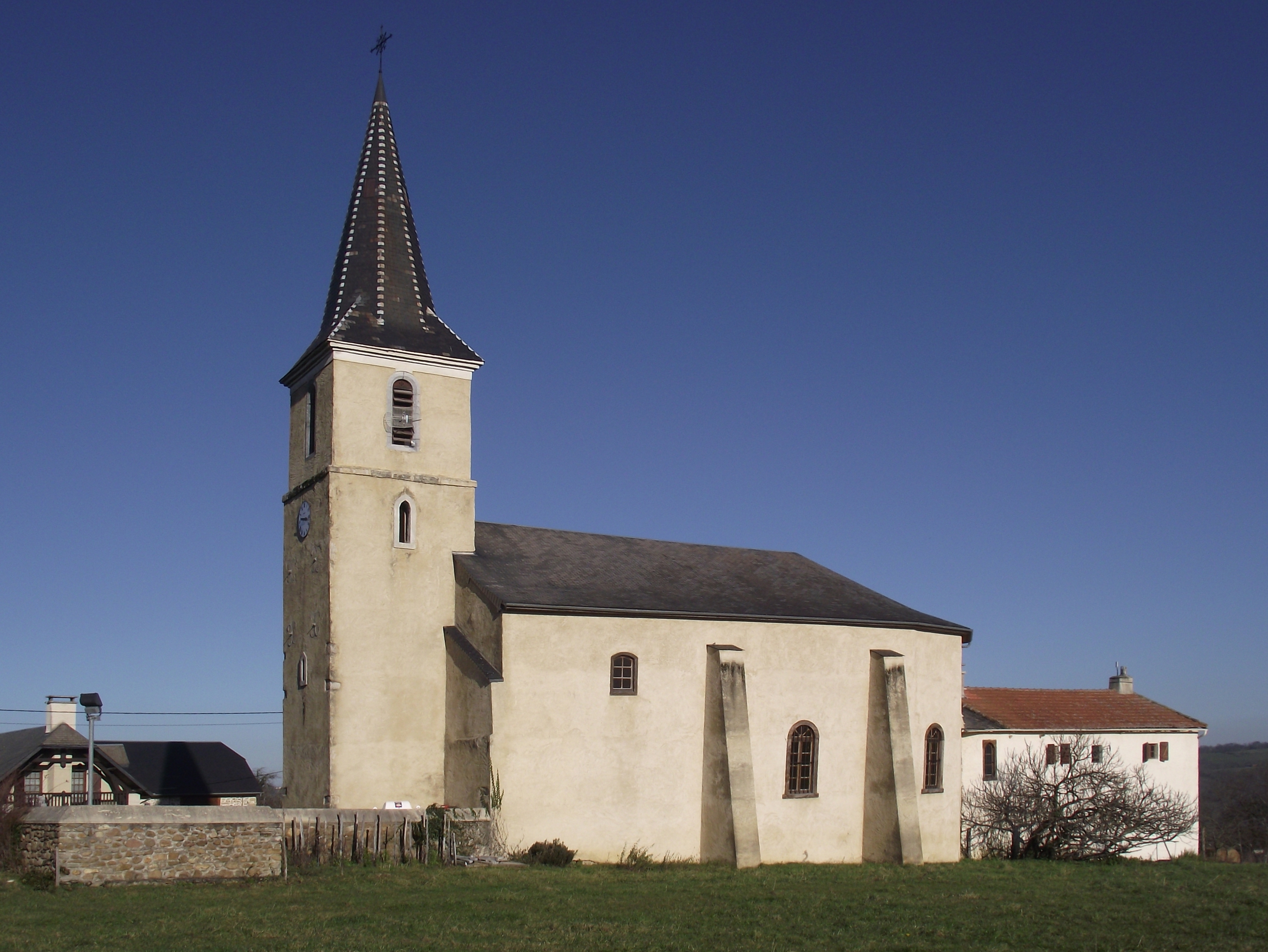 Église de Chelle-Spou (Hautes-Pyrénées, France)